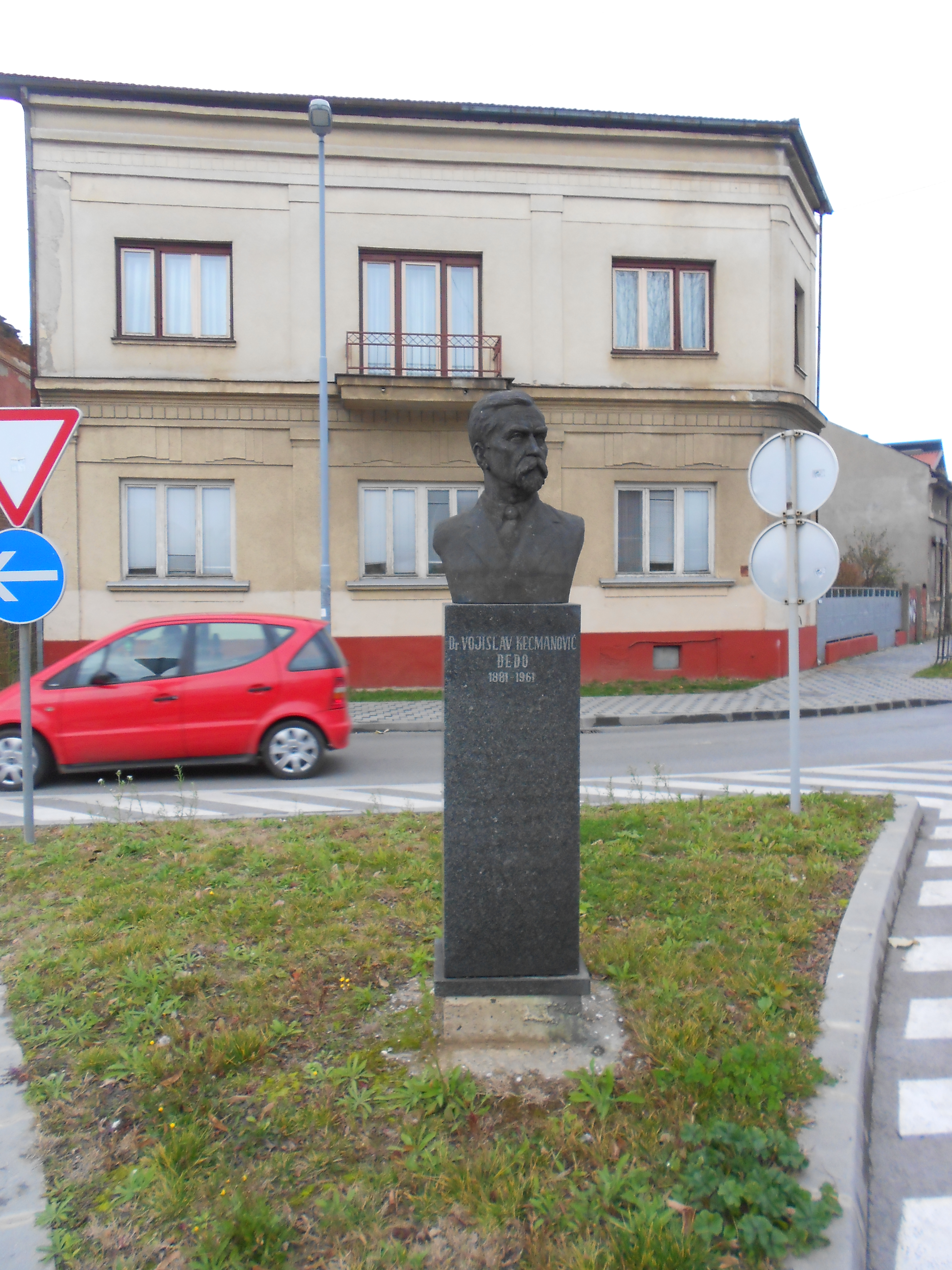 Споменик Веселину Кецмановићу Ђеди у Бијељини